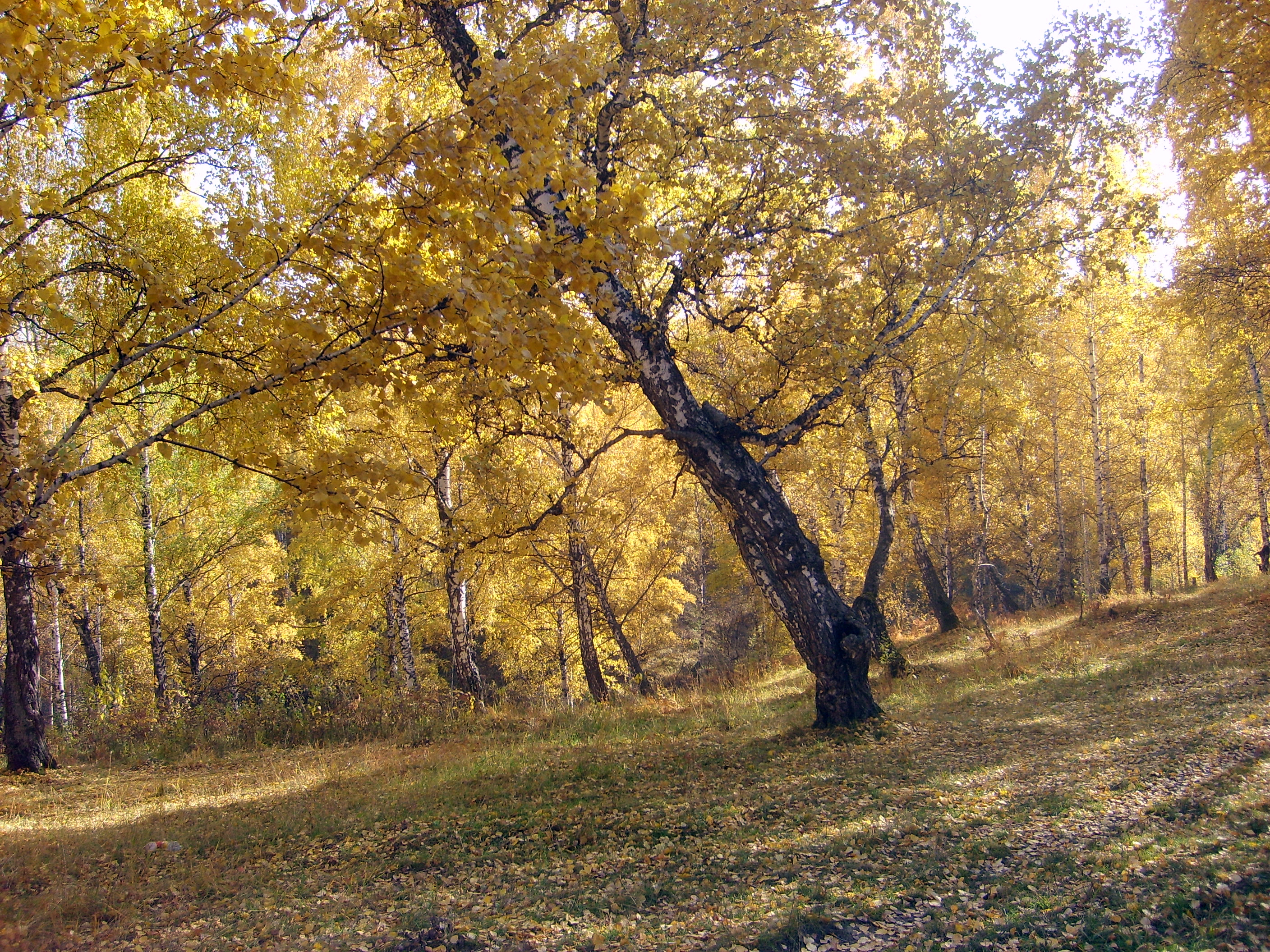 Березовая роща. Красный Камень. Киселевск.